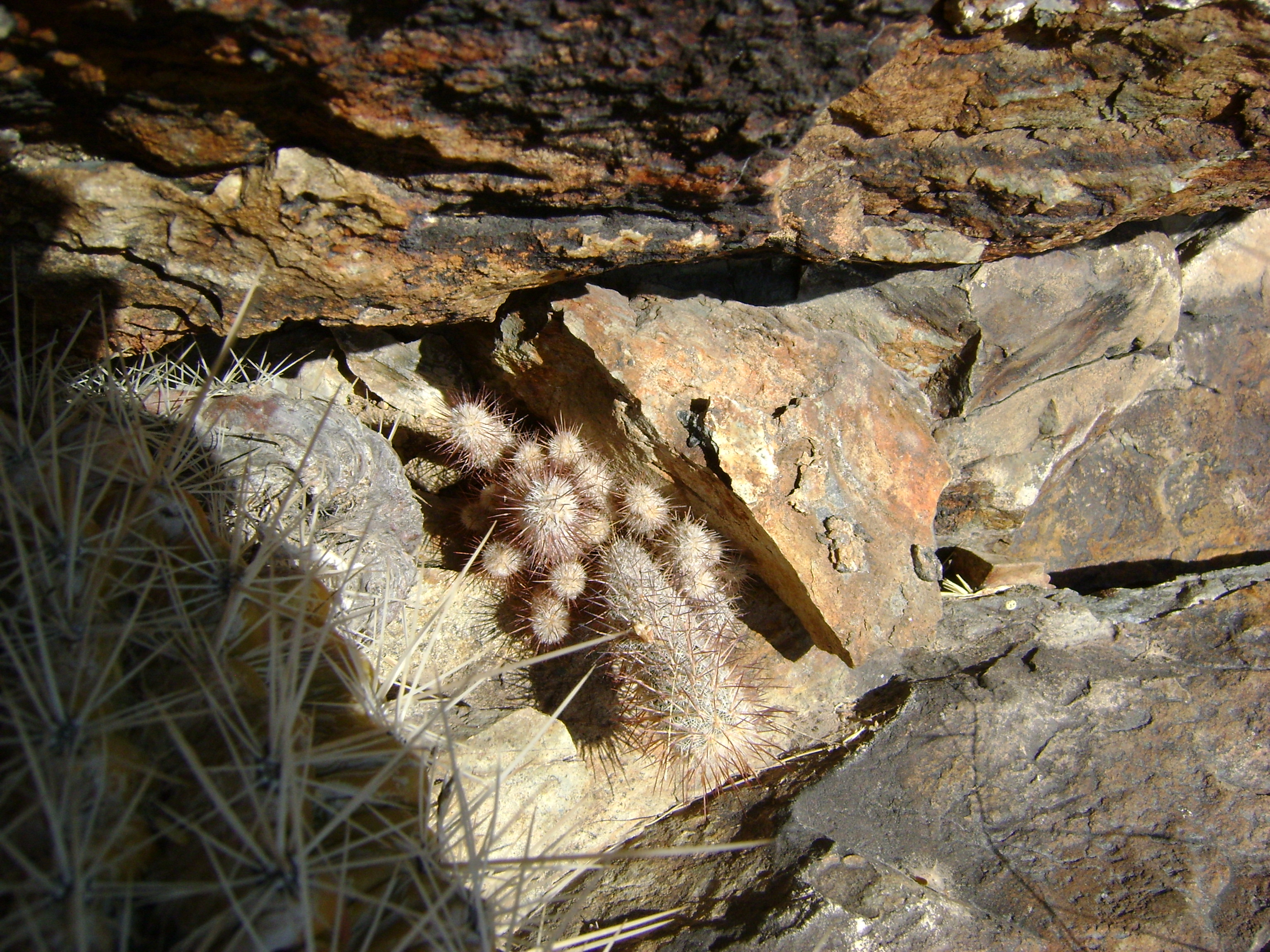 Bermejillo to Mapimi, Durango